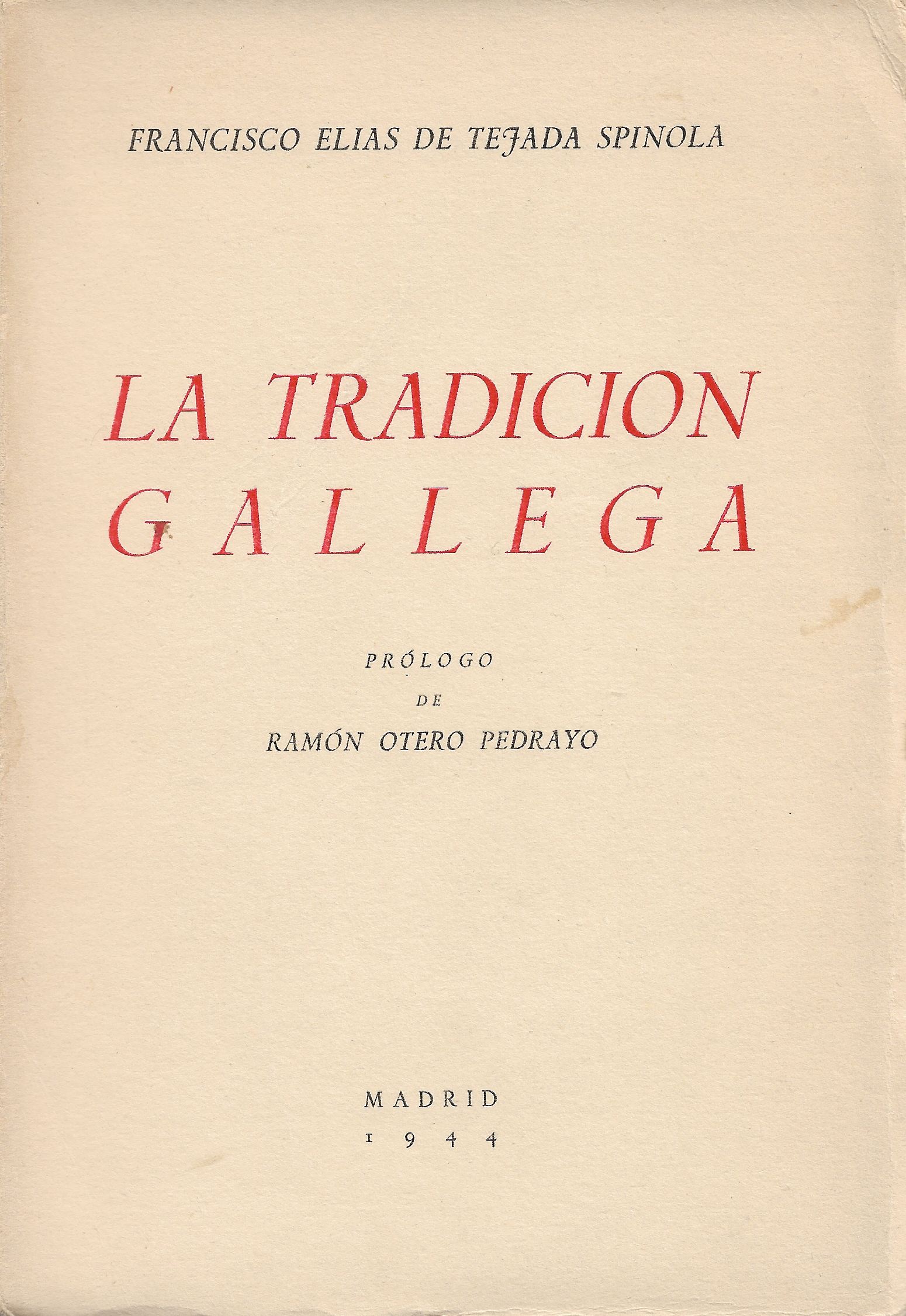 Portada da primeira edición de 'La tradición gallega' de Francisco Elías de Tejada (1944)